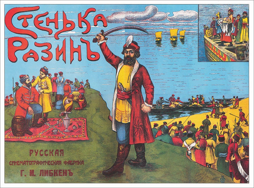 Плакат к фильму «Стенька Разин». Автор плаката — Петр Мосягин. Режиссер: Григорий Либкен Сценарист: Борис Мартов Оператор: Брицци Художник: Петр Мосягин Производство: Акц. о-во "Г.Либкин" (Ярославль) Жанр: драма Год: 1914 Актеры: В. Поливанов, Ольга Оболенская, Анна Пасхалова Фильм сохранился не полностью, без надписей.